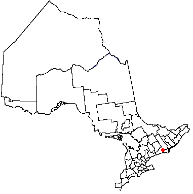 Quinte West, Ontario